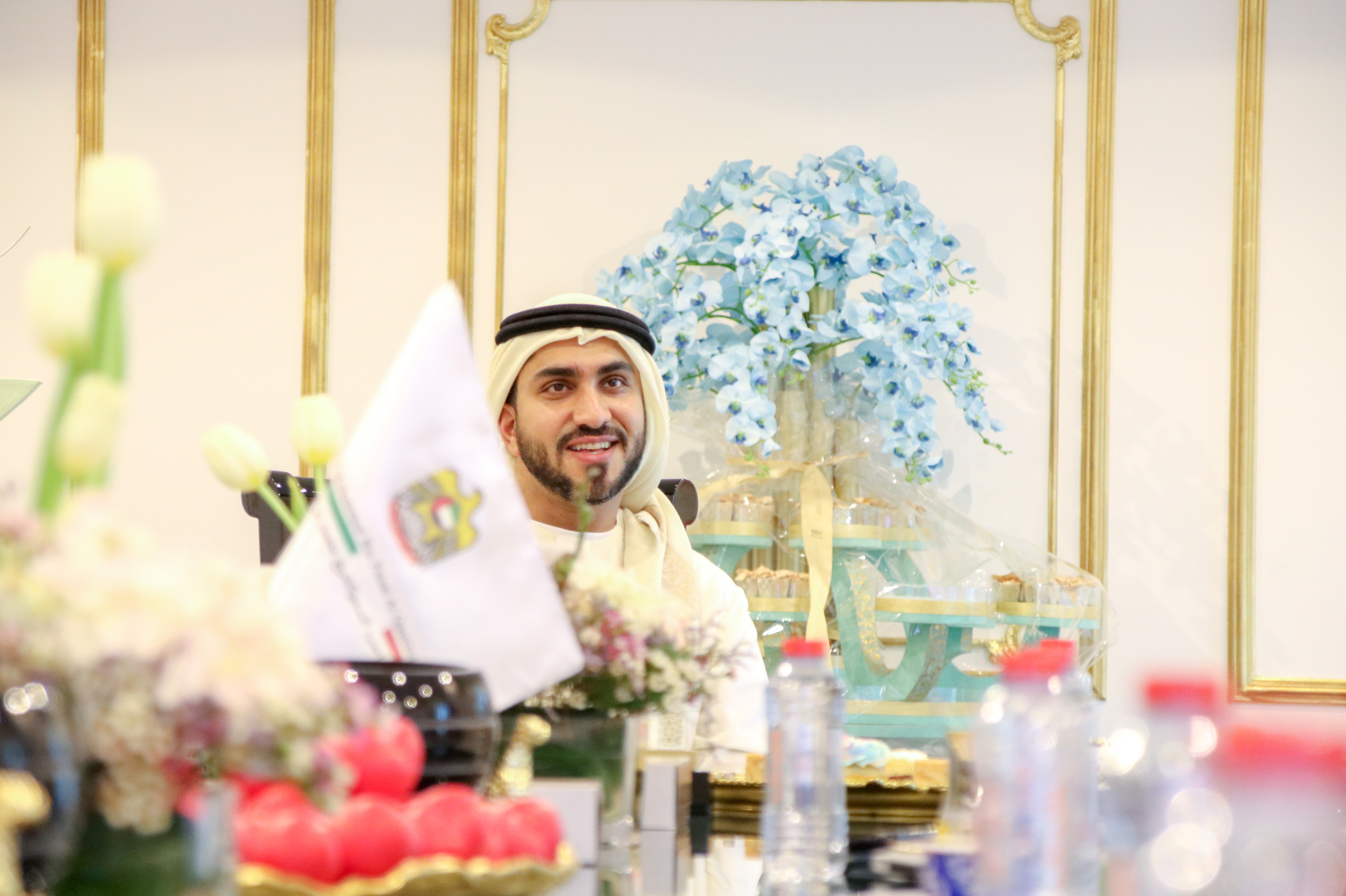 الشيخ محمد بن فيصل القاسمي - الشارقة